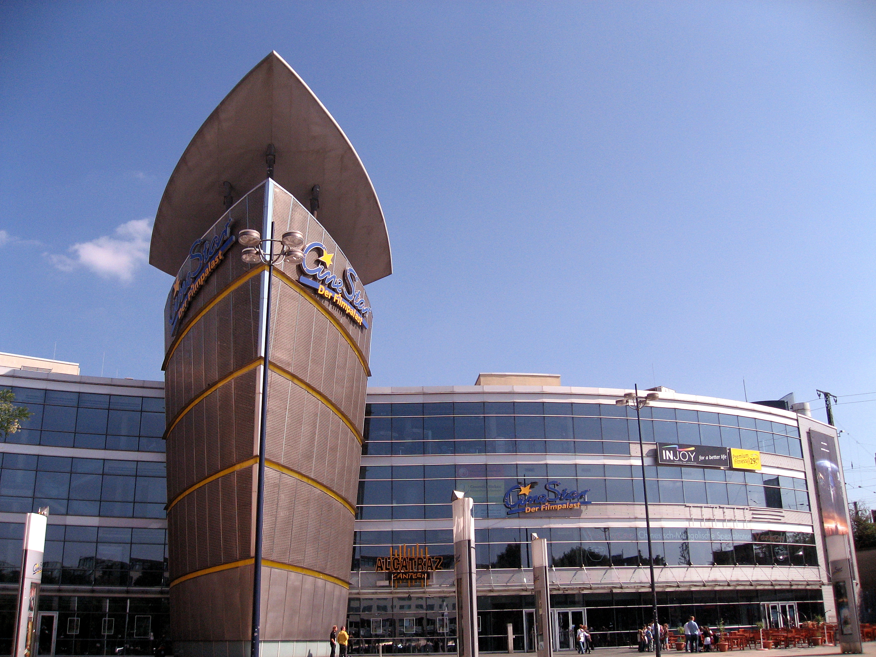 Dortmund, Nordstadt, Steinstraße, Kino CineStar